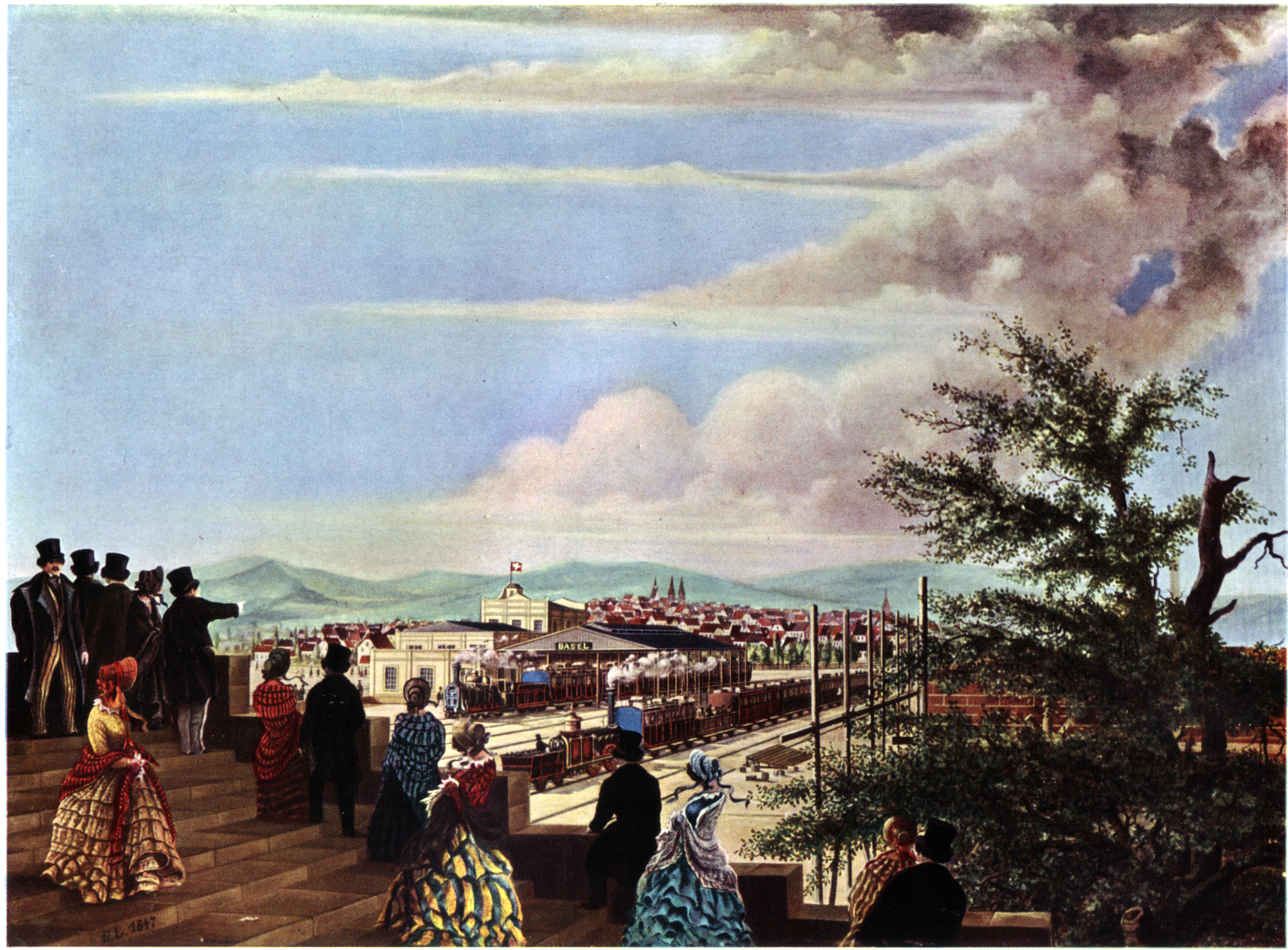 Der französische Bahnhof in Basel. Am 11. Dezember 1845 als erster Bahnhof auf dem Boden der Schweiz eingeweiht.